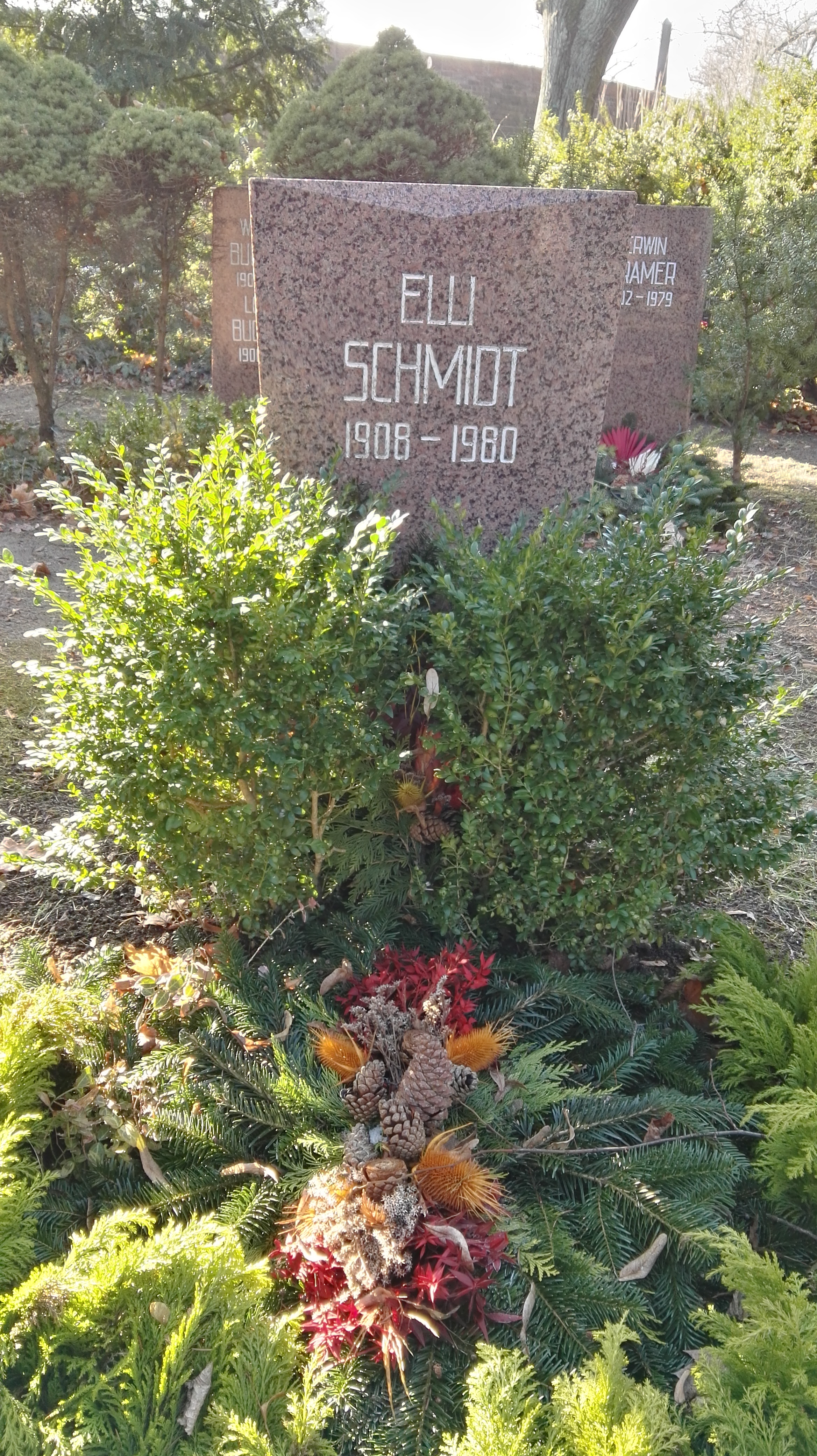 Grab von Elli Schmidt in der Grabanlage Pergolenweg auf dem Sozialistenfriedhof des Zentralfriedhofs Friedrichsfelde